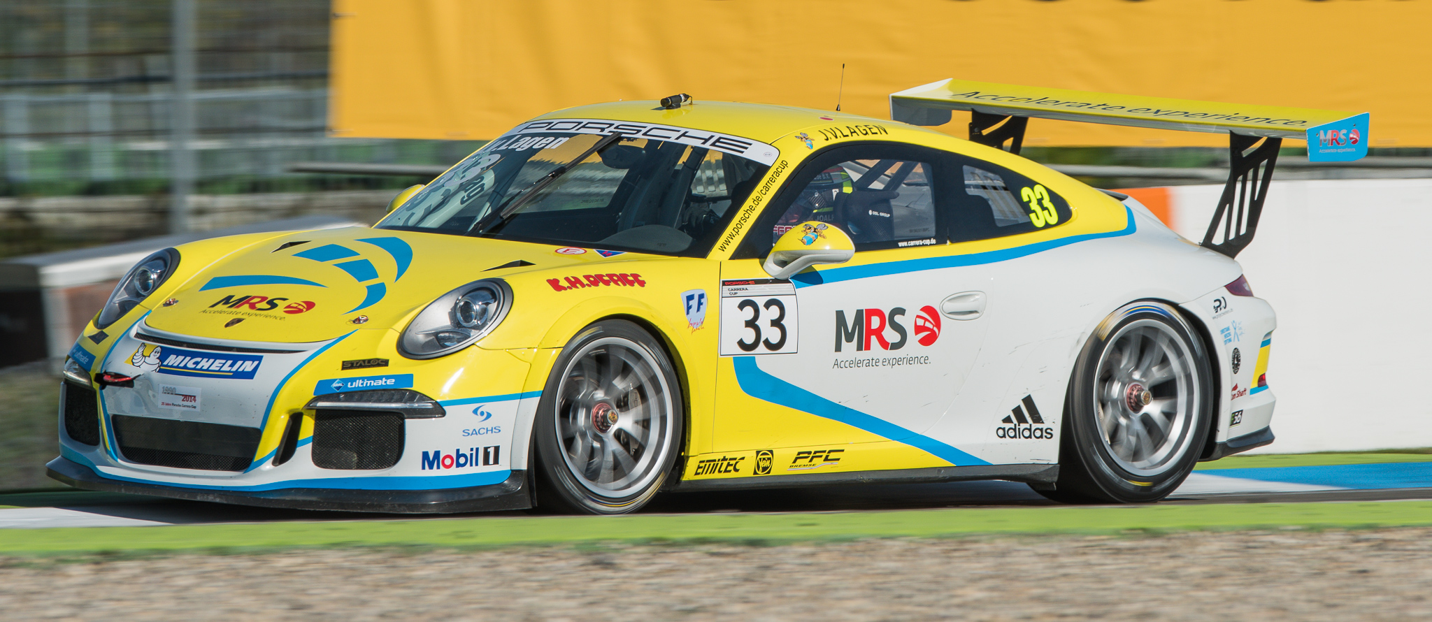 Hockenheimring,Jaap van Lagen,Motorsport,Porsche 911 GT3 Cup (Typ 991),Porsche Carrera Cup Deutschland,TECE MRS-Racing